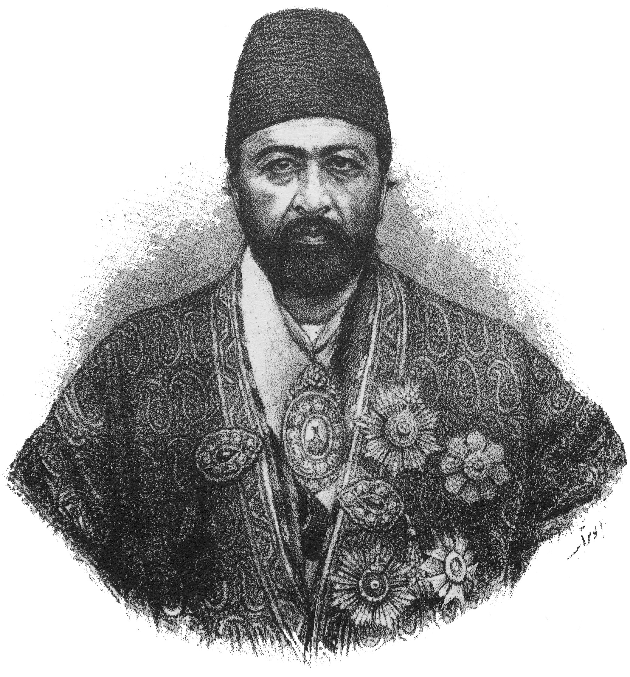 نظام‌الملک وزیرلشکر